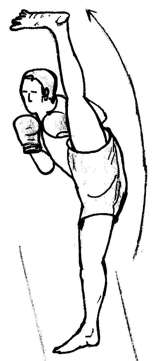 cardio0.jpg